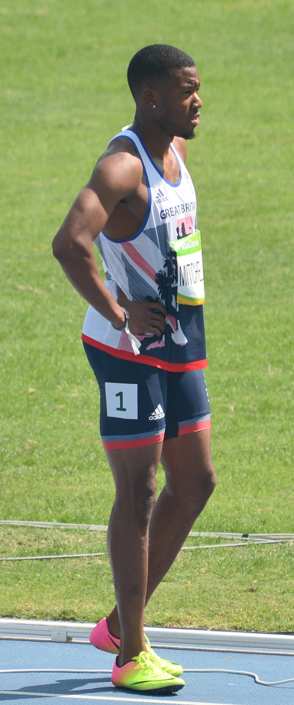 Séries du 200m Homme aux JO de Rio 2016